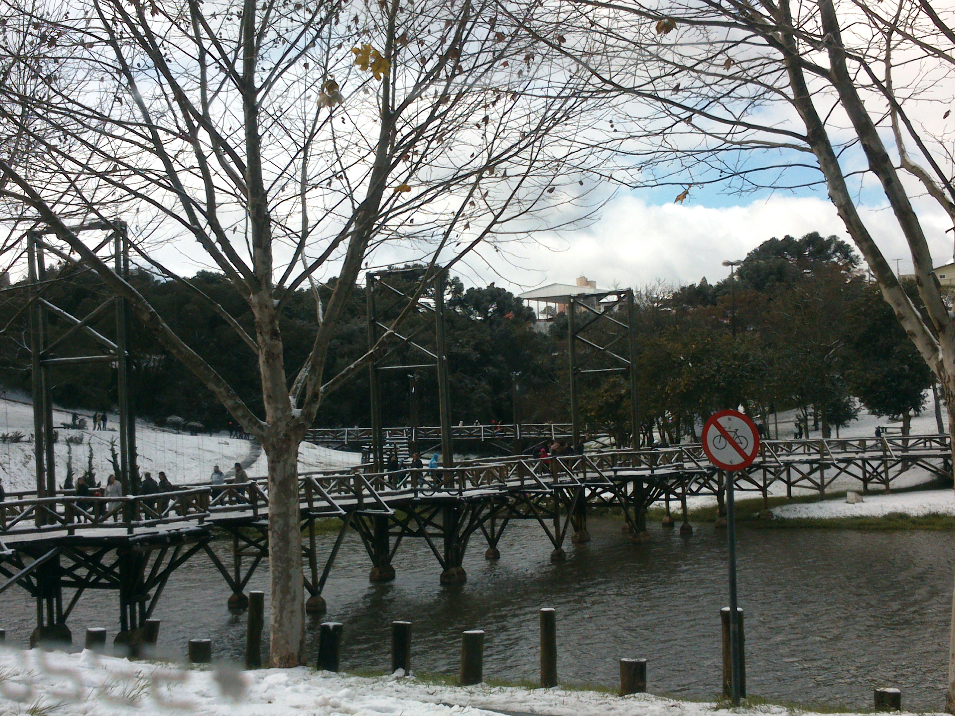 O dia em que nevou em Guarapuava 22/07/2013